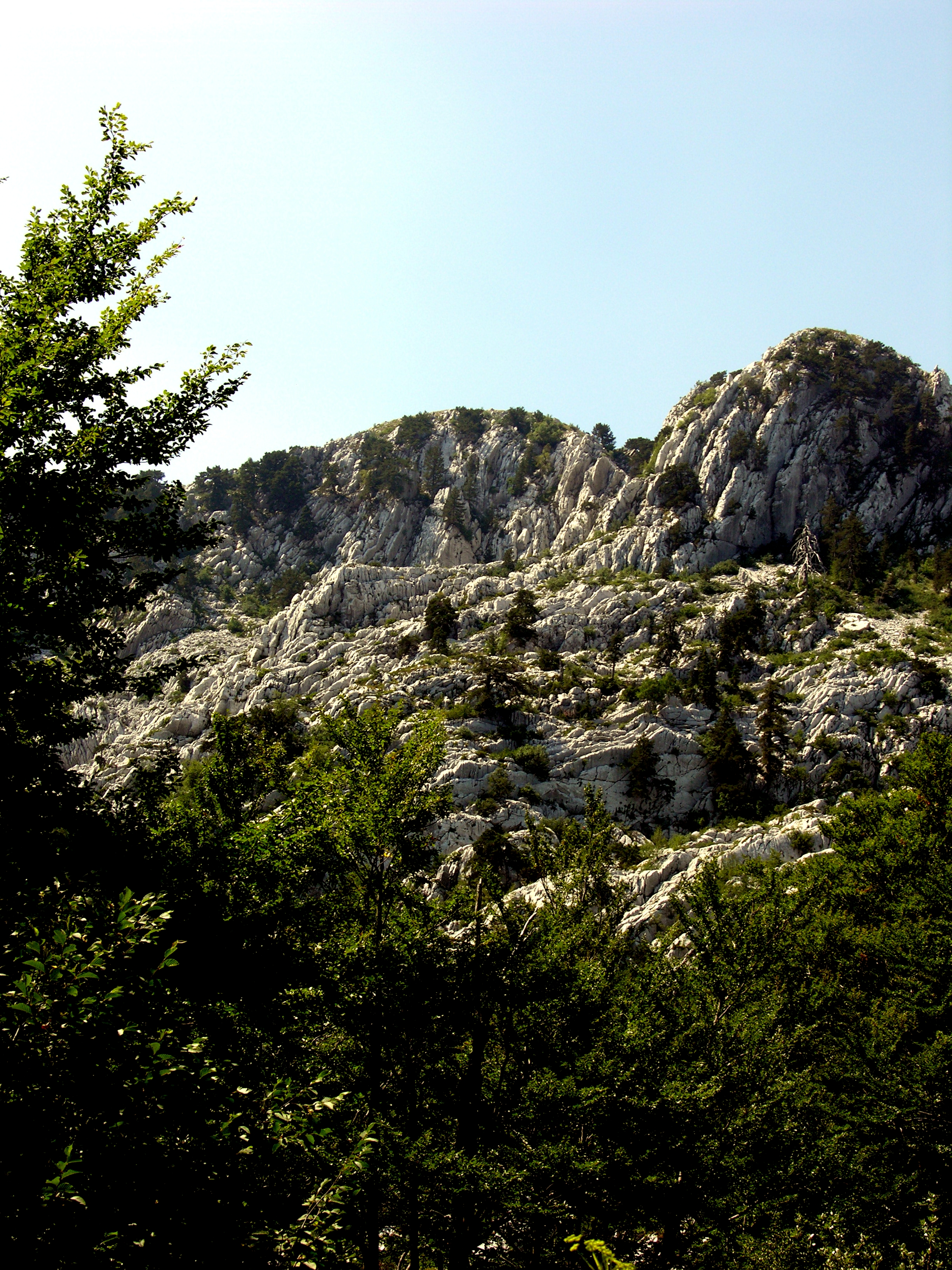 Velje leto im Pazua Kamm/Orjen Montenegro